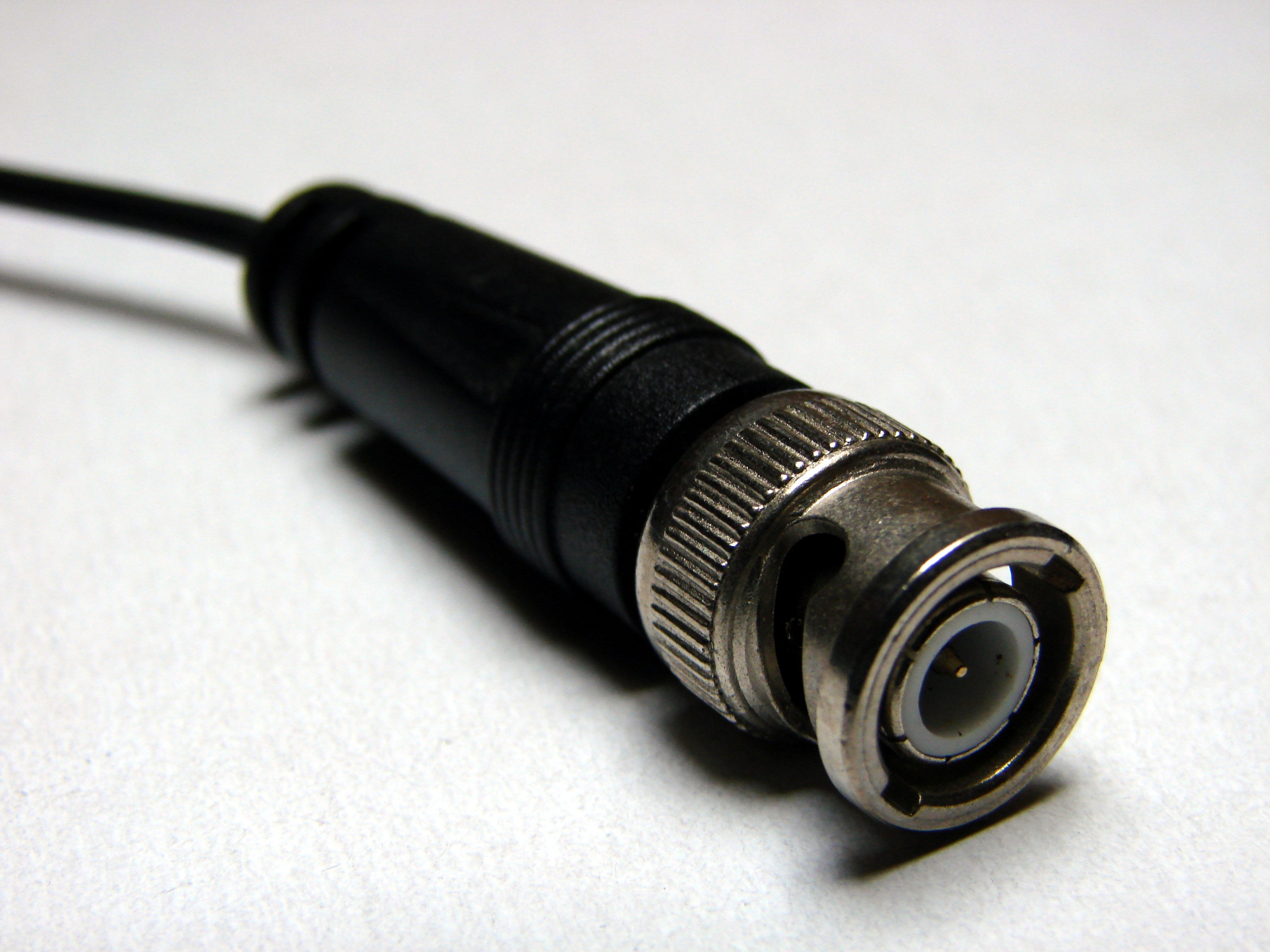 BNC connector (male)